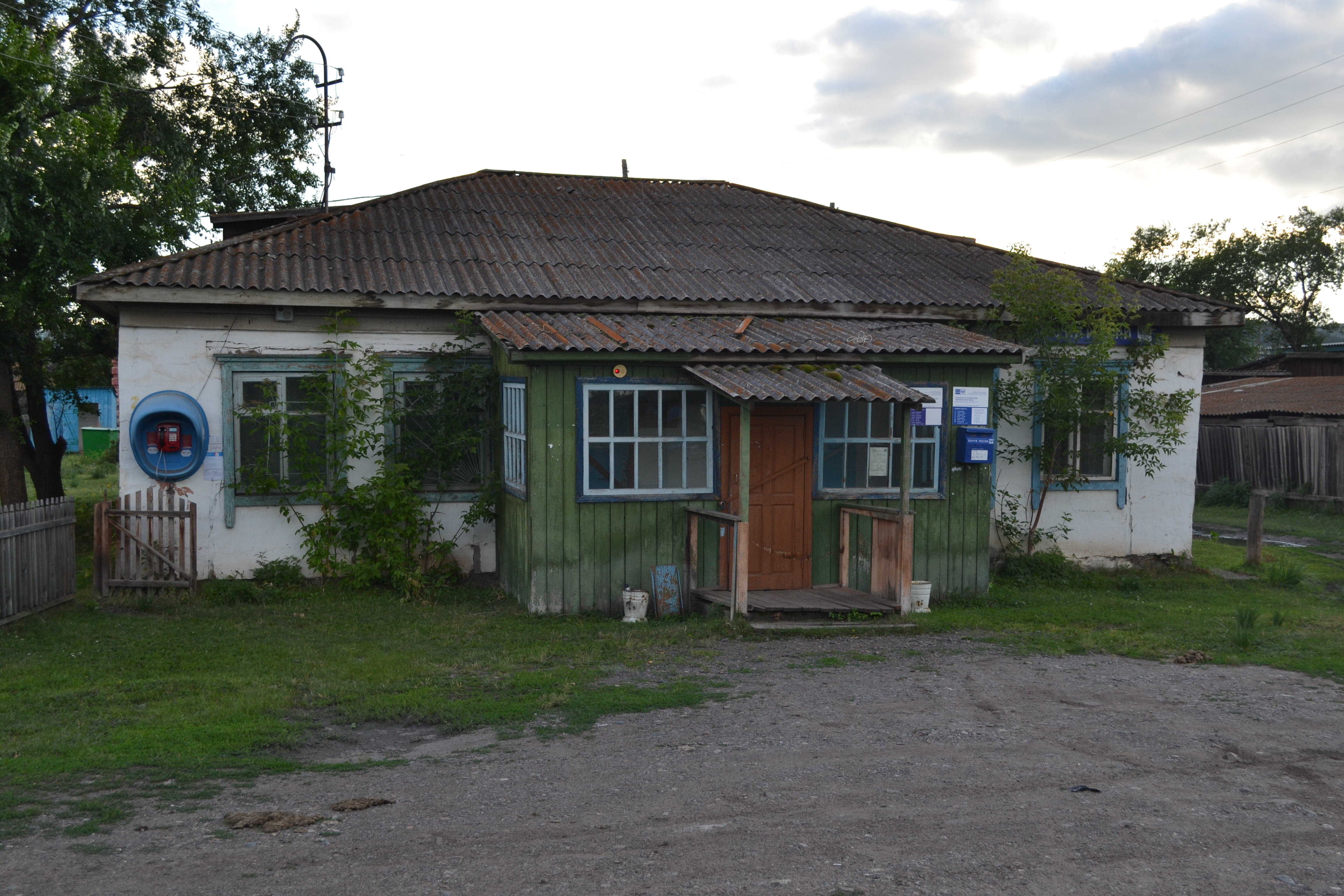 Почтовое отделение